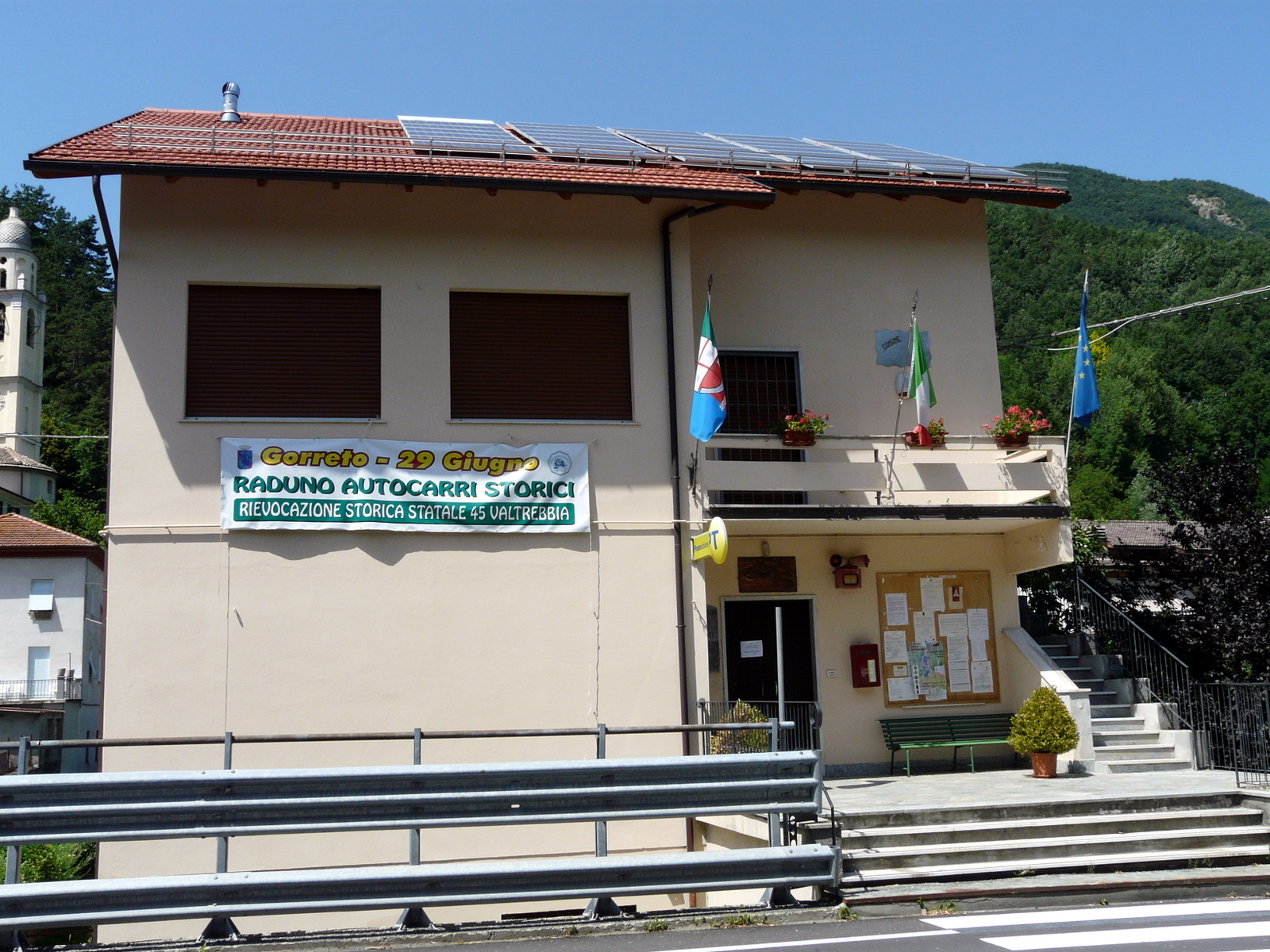 Municipio di Gorreto, Liguria, Italia